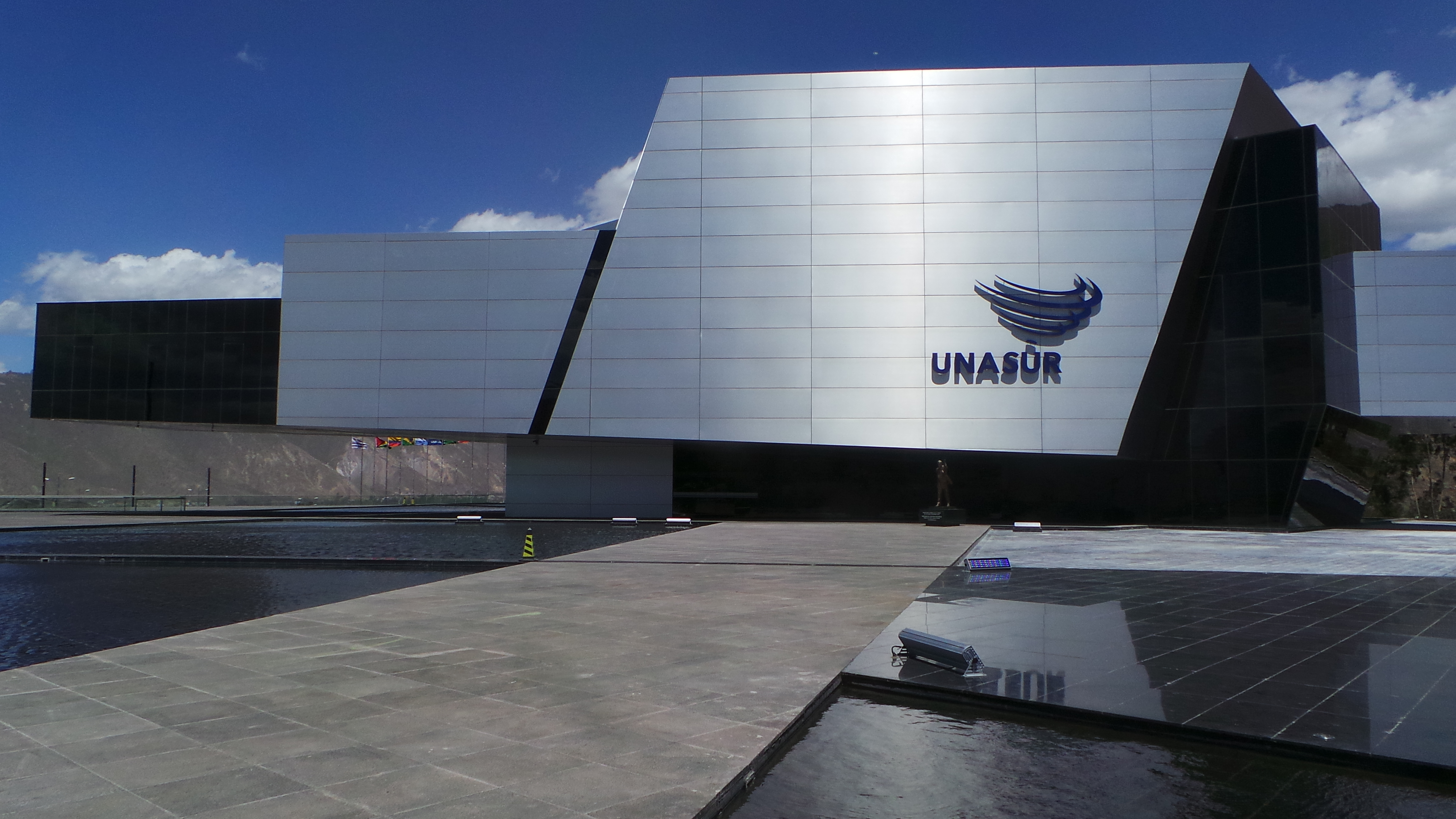 Sede de la Secretaría General de Unasur en la Mitad del Mundo, Ecuador